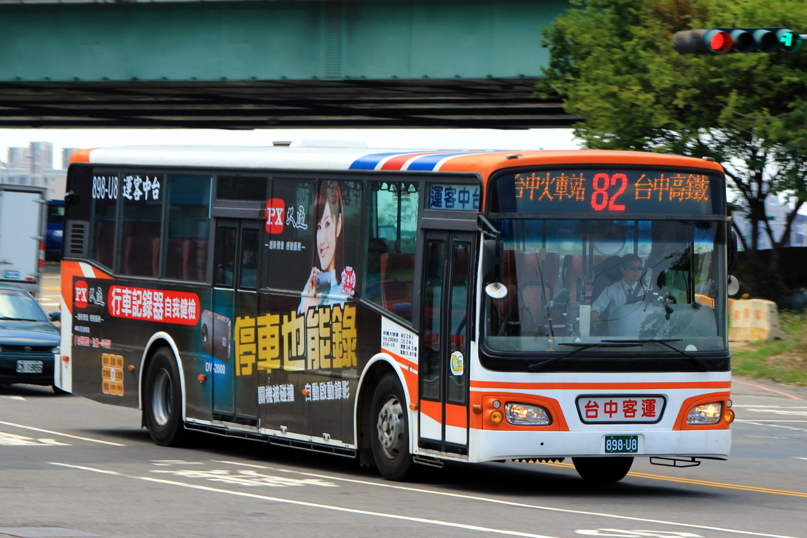 中文（台灣）: 原首都客運2008年之HINO雙門車,2015轉手台中客運